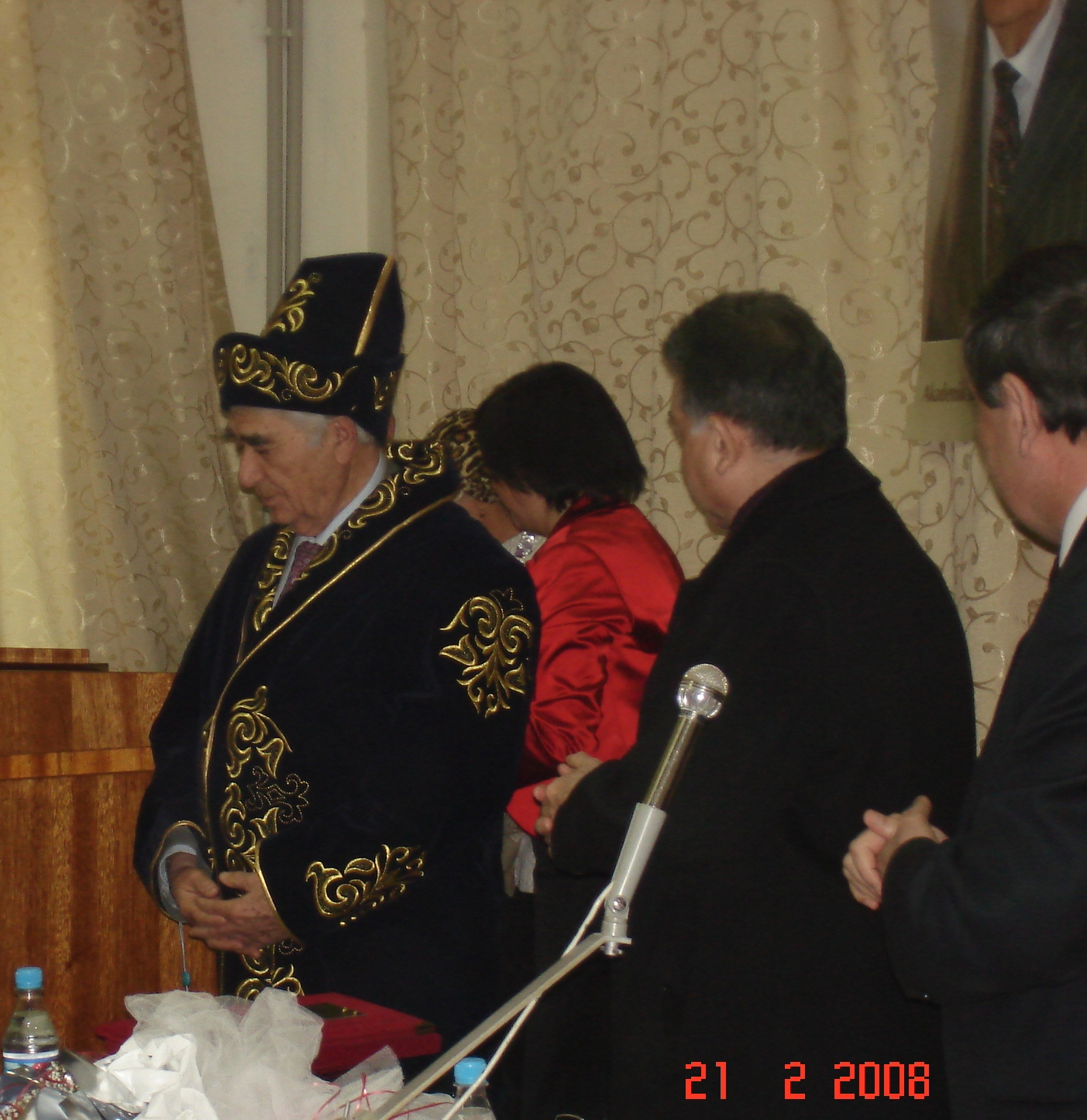 Budaq Budaqov